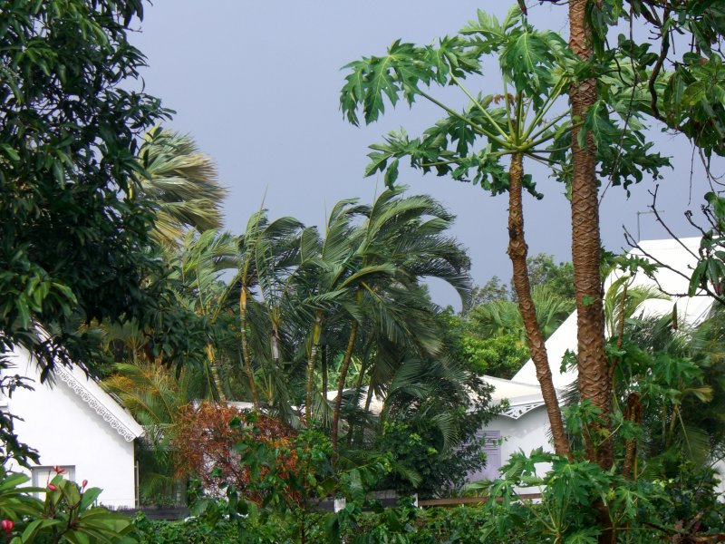 7:30 : vents de 70/100 km/h. Alerte orange. Gamède approche. Photo personnelle, La Réunion (Sud) approche du cyclone Gamede, samedi 24 février 2007